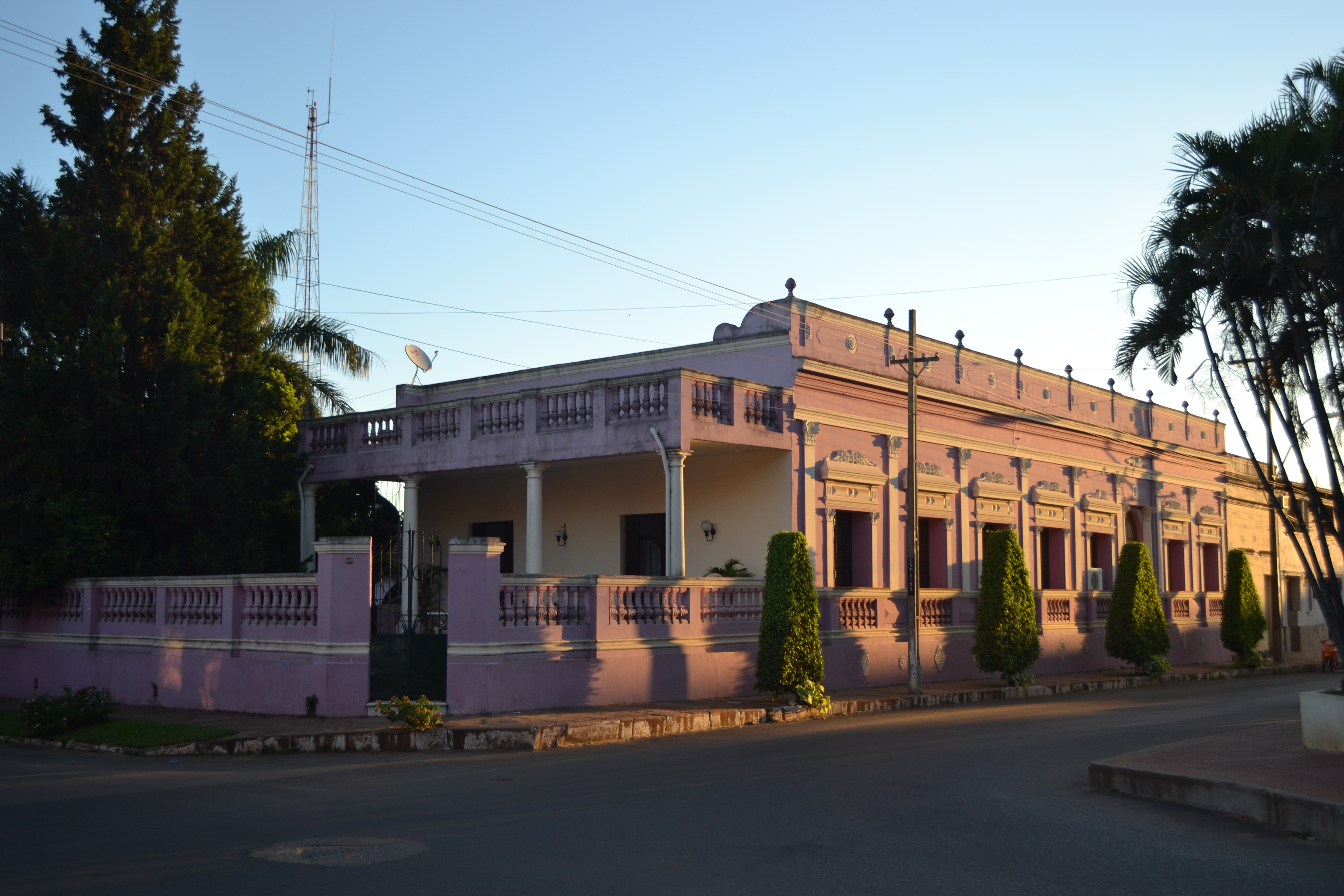 Casa en Villarrica, Paraguay